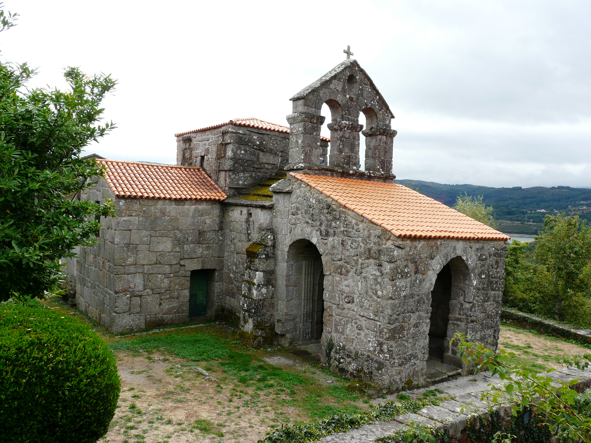 Iglesia visigoda, siglo VII, Bande (Orense) Aspecto exterior - Camara Lumix FZ18, 2048x1536